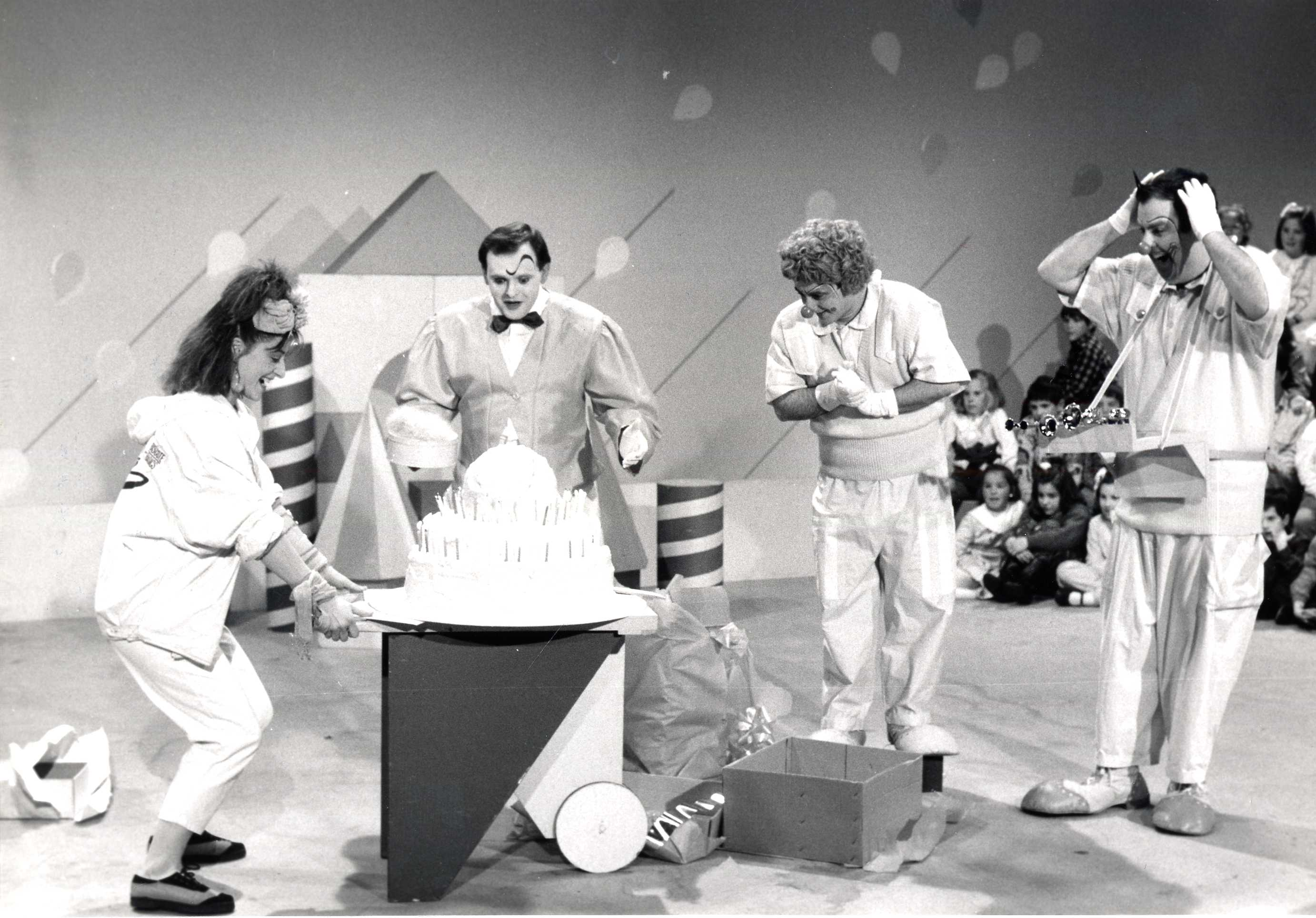 Don Don Kikilikon 1987